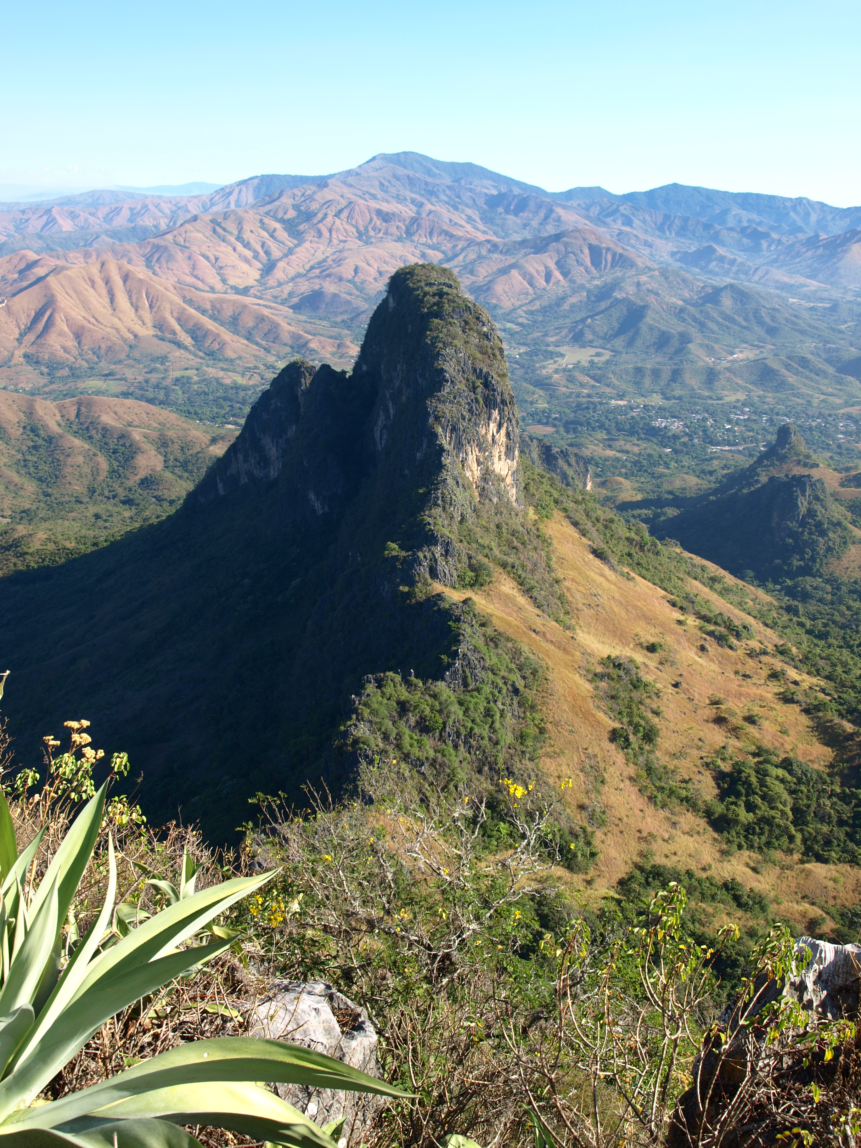 COMO UN PEQUEÑO MACHU PICCHU.